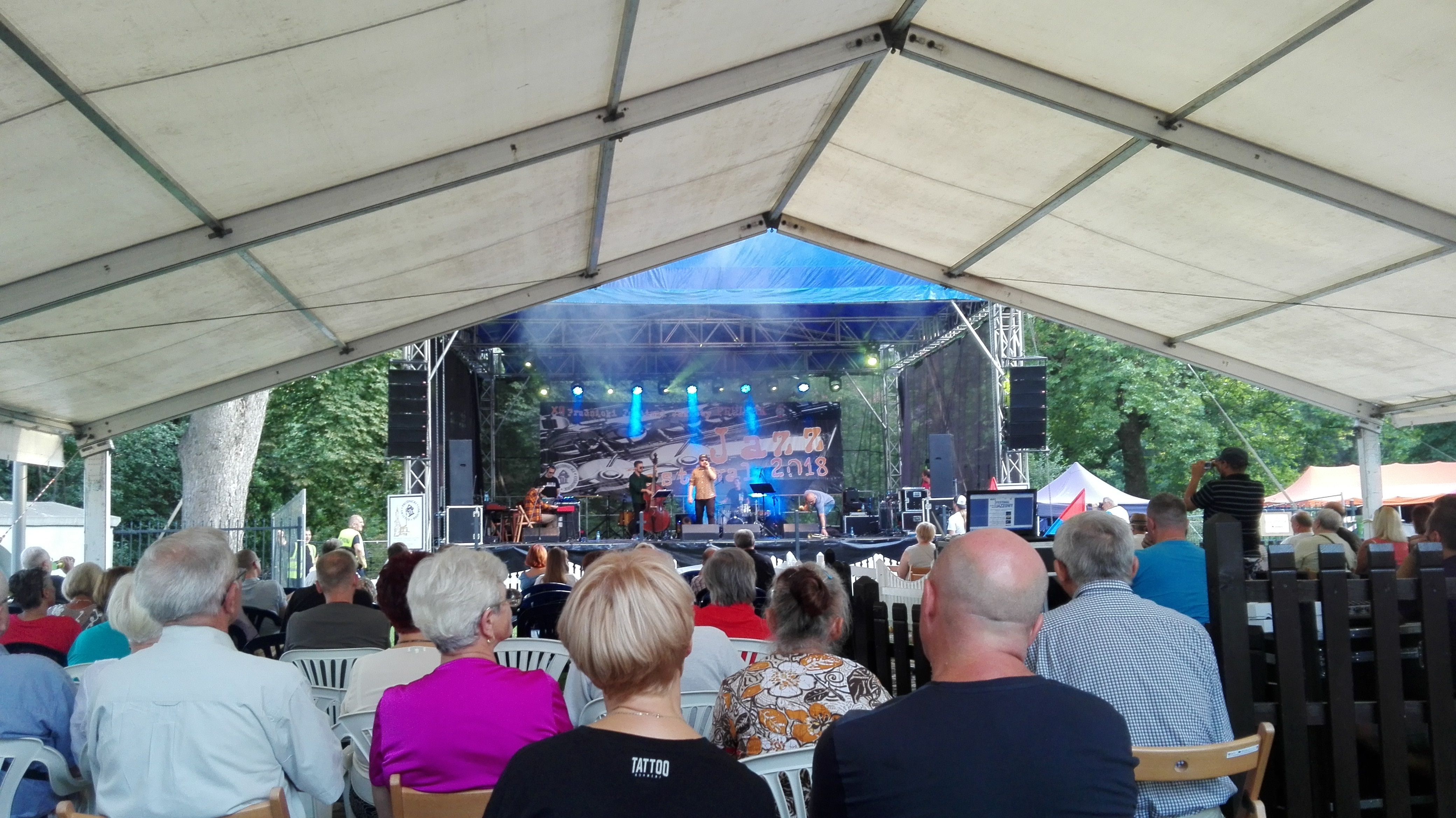 Prudnik, XII Festiwal Jazzowy